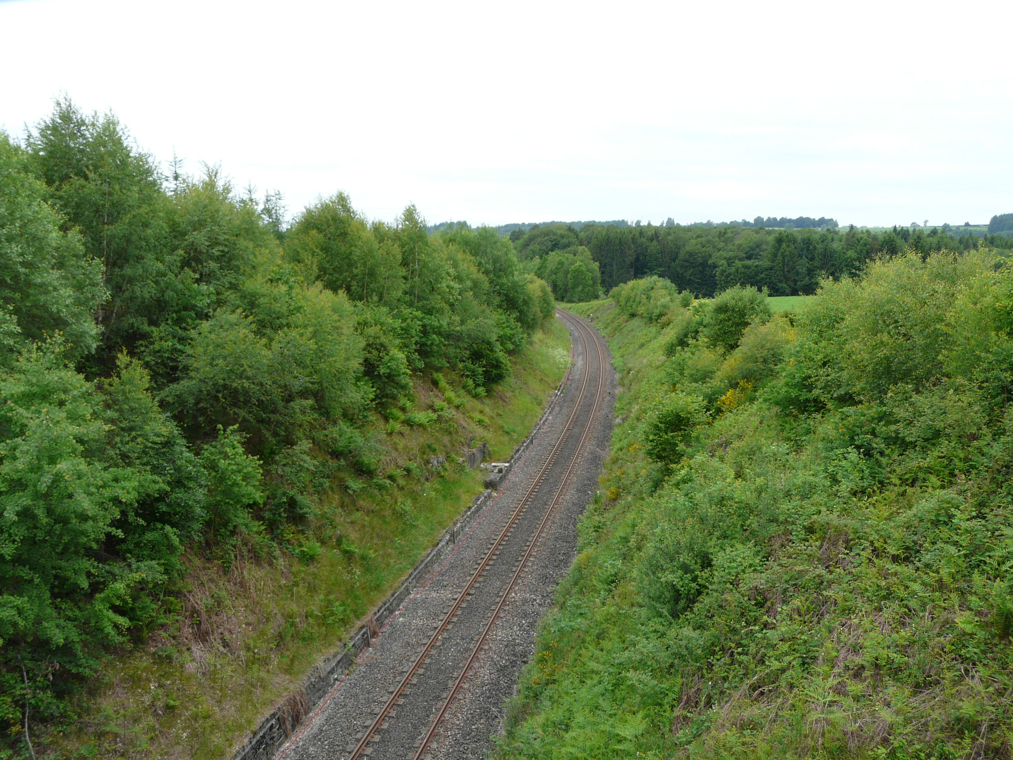 La voie ferrée au pont Farget, Aix, Corrèze, FRance.